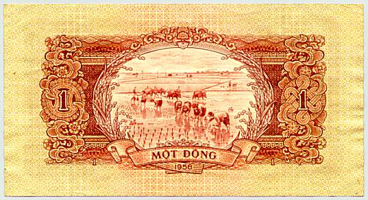 Vietnam 1 Dong 1958 Reverse